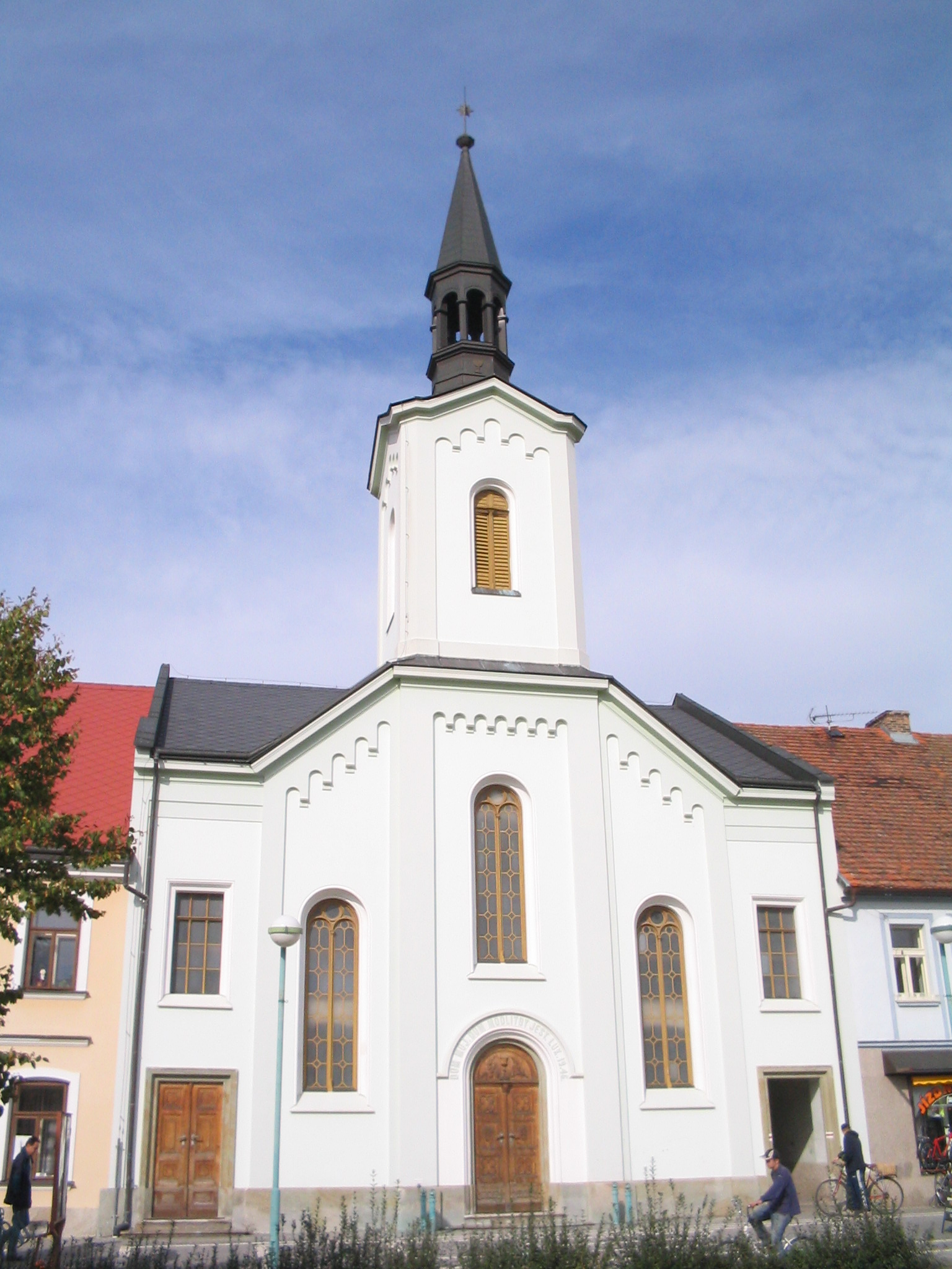 Kostel a fara ČCE v Třebechovicích pod Orebem (ČR) na Masarykově náměstí.